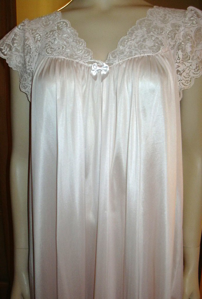 own work silky nightie